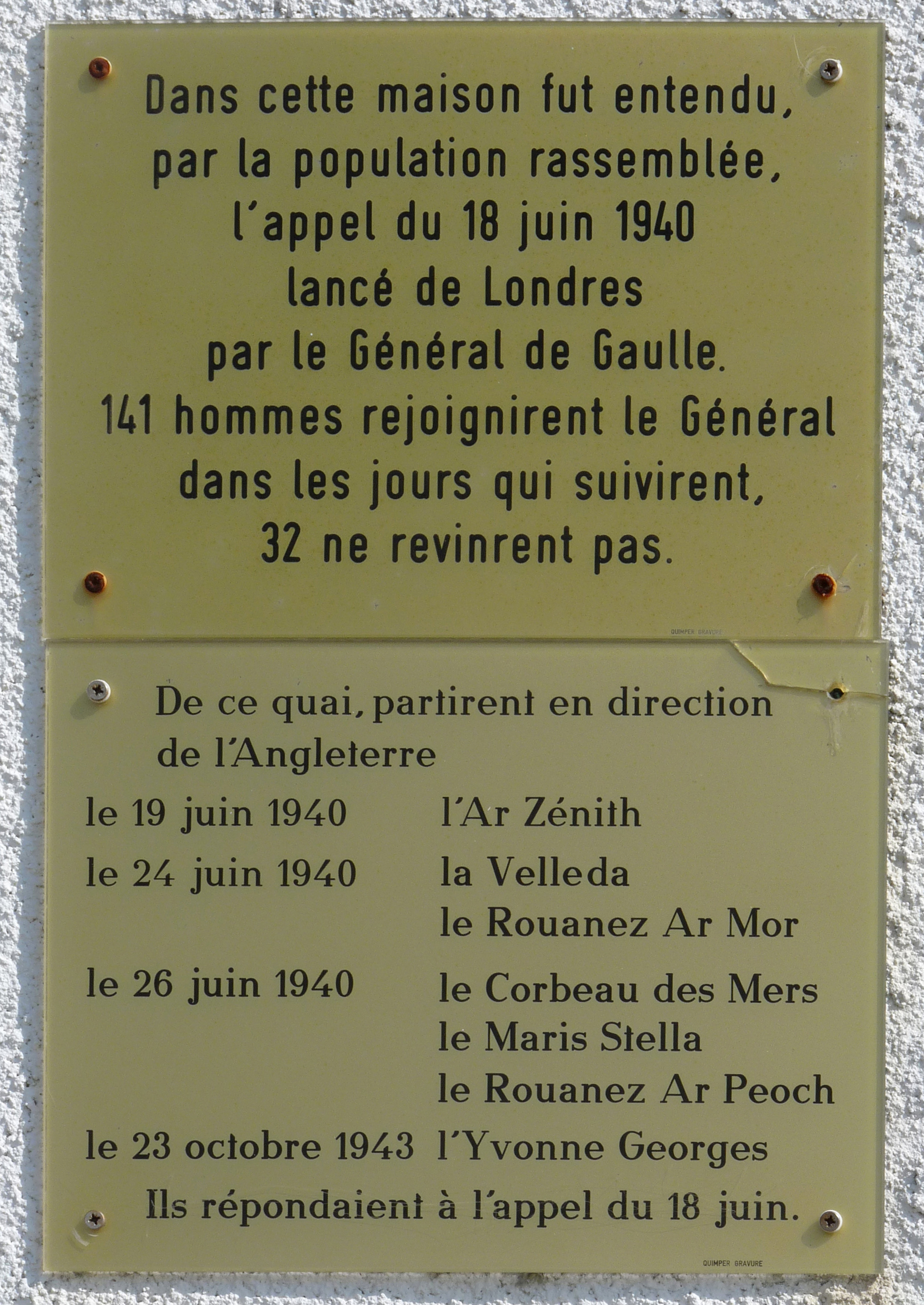 Plaque commémorant le départ des pêcheurs de l'île de Sein en réponse à l'appel du 18 juin 1940 du général de Gaulle (Île de Sein, Finistère, Bretagne)